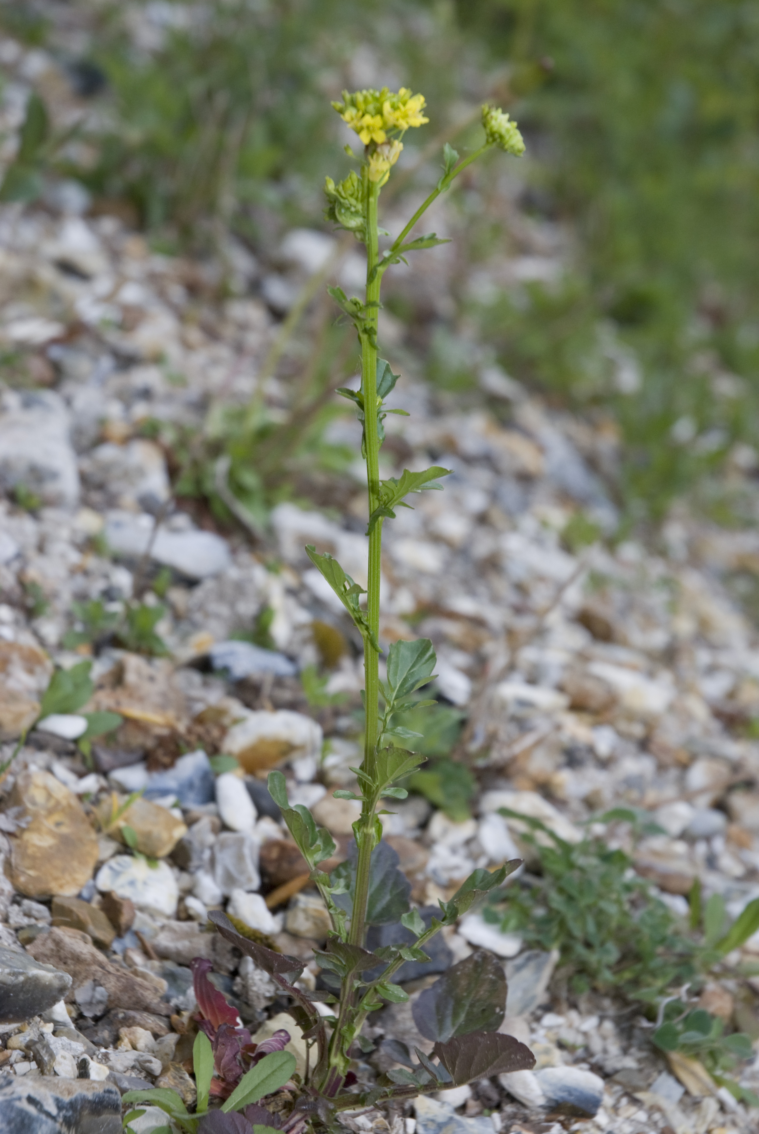 Barbarea vulgaris Marais de Belloy-sur-Somme (Somme), France